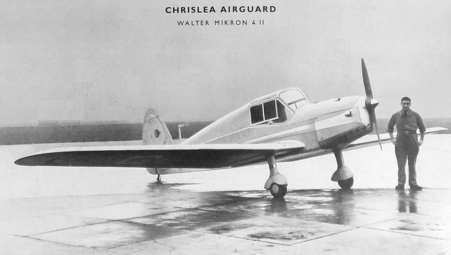 Walter Mikron II a Chrislea L.C.1 Airguard (1938)